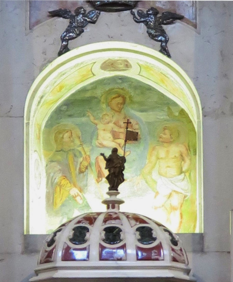 Presbiterio con affresco cinquecentesco di Bartolomeo Mangiavino di Salò che raffigura la Madonna con il Bambino e i santi Sebastiano e Rocco